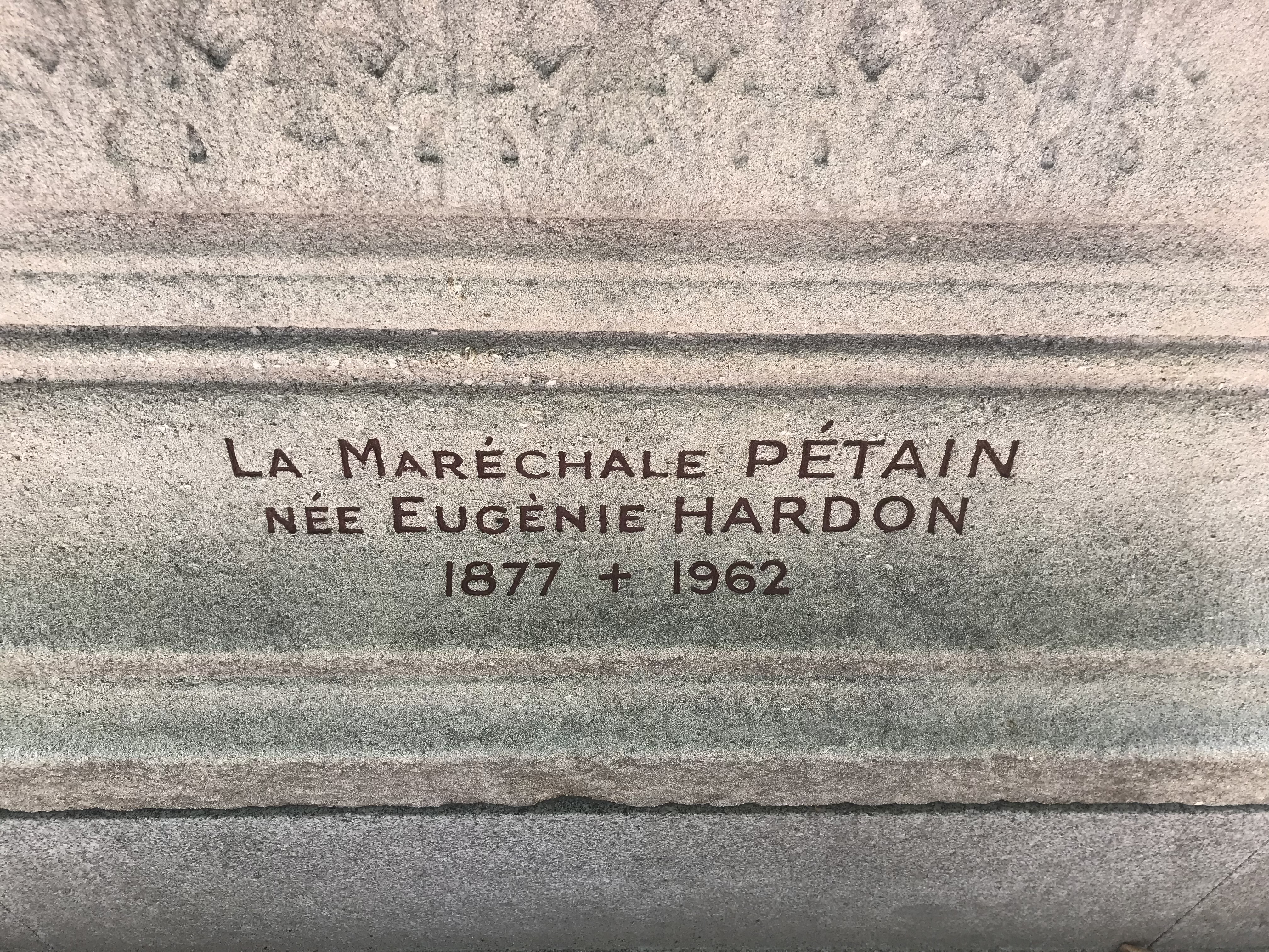 Tombe de la famille Hardo : La Maréchale Pétain.